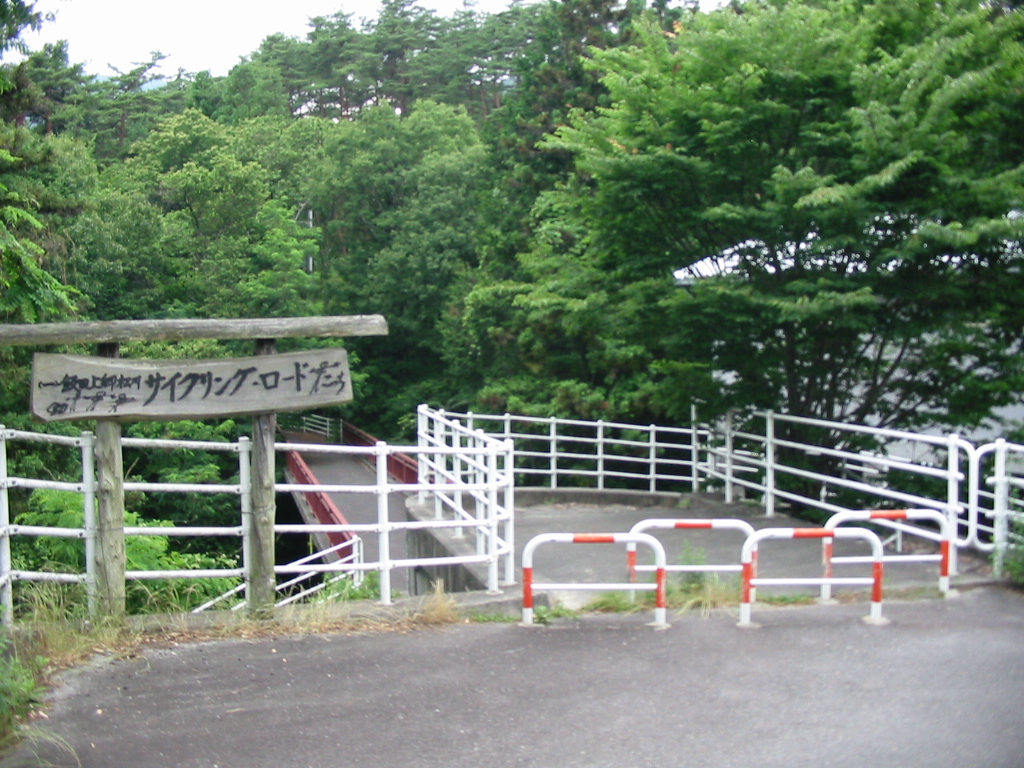 飯田上郷松川サイクリングロード